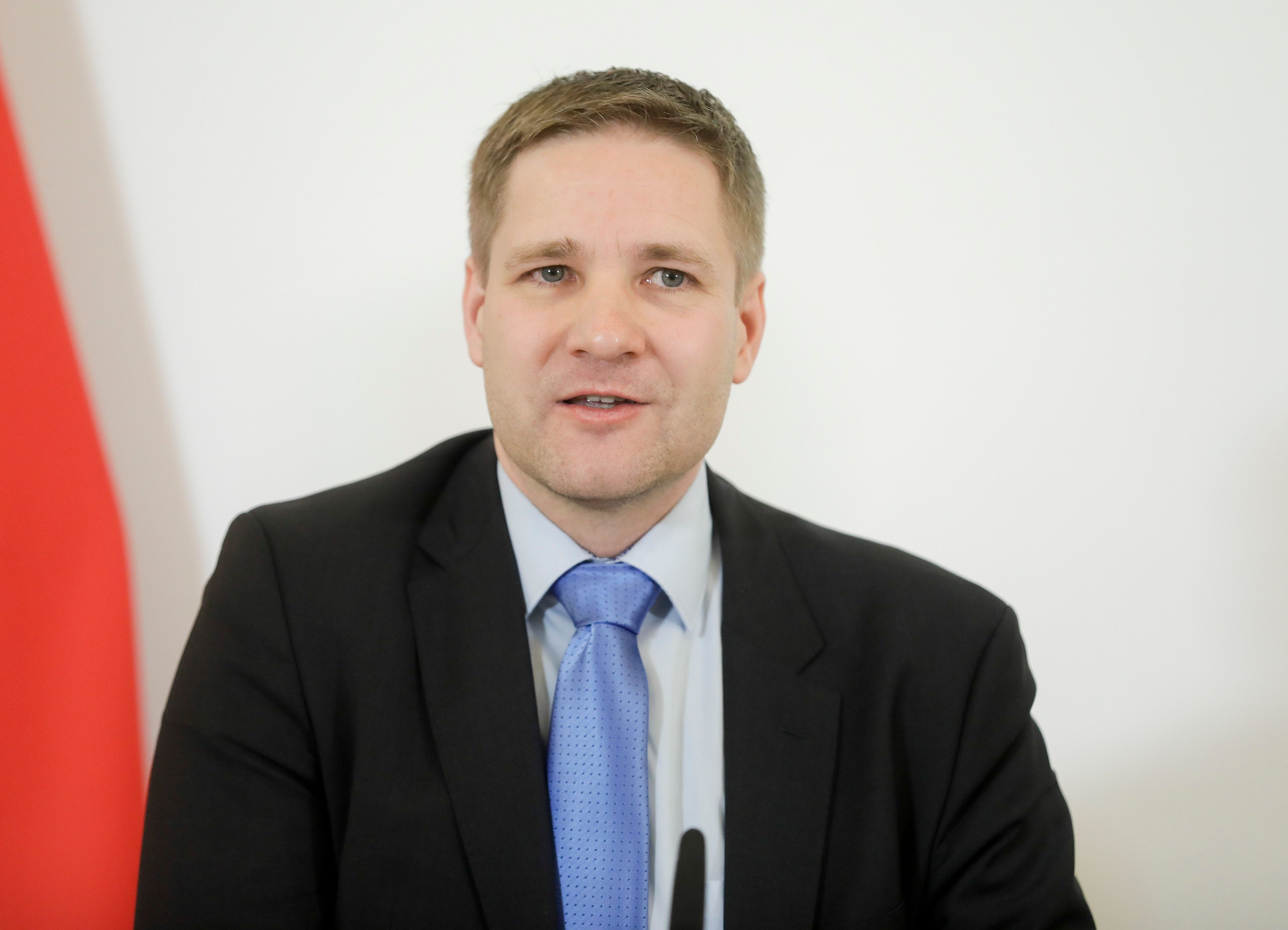 Am 16. März 2020 fand ein Pressestatement zu den Maßnahmen gegen die Krise im Bundeskanzleramt statt. Im Bild OeNB-Vize-Gouverneur Gottfried Haber.